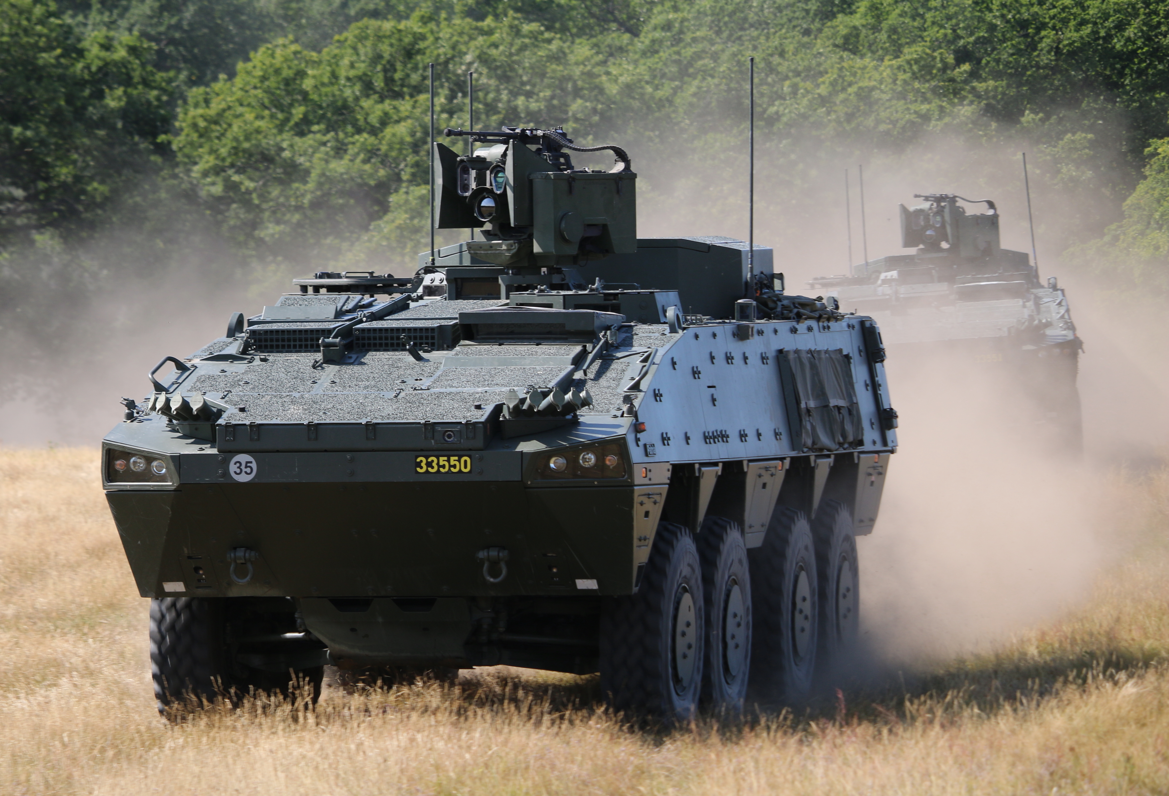 Pansarterrängbil 360 Revinge 2015